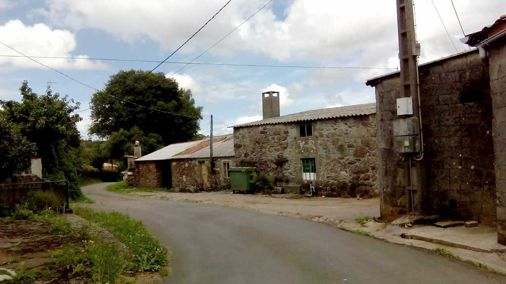 Vista de Alvite, Curtis.